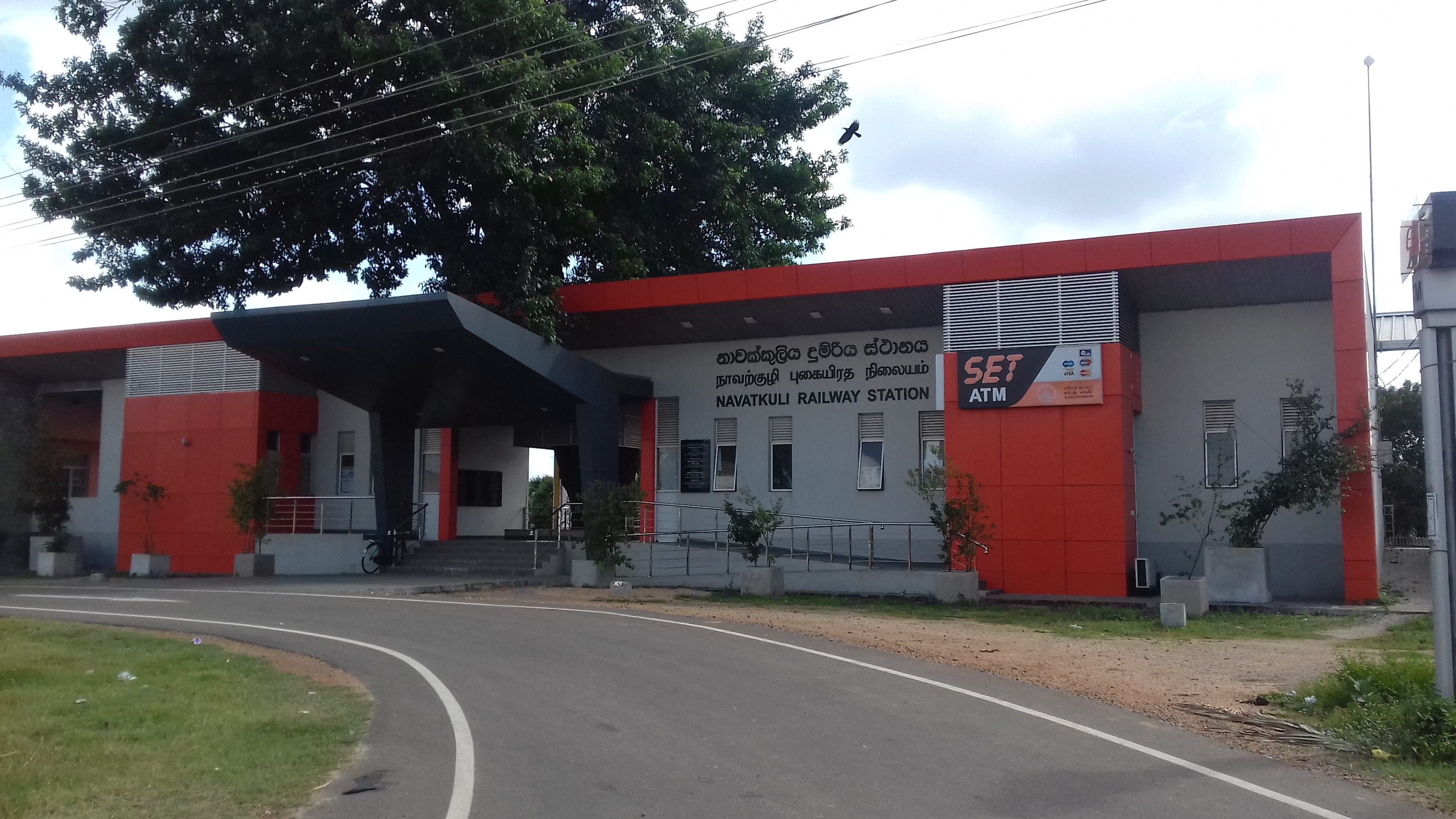 Railway station